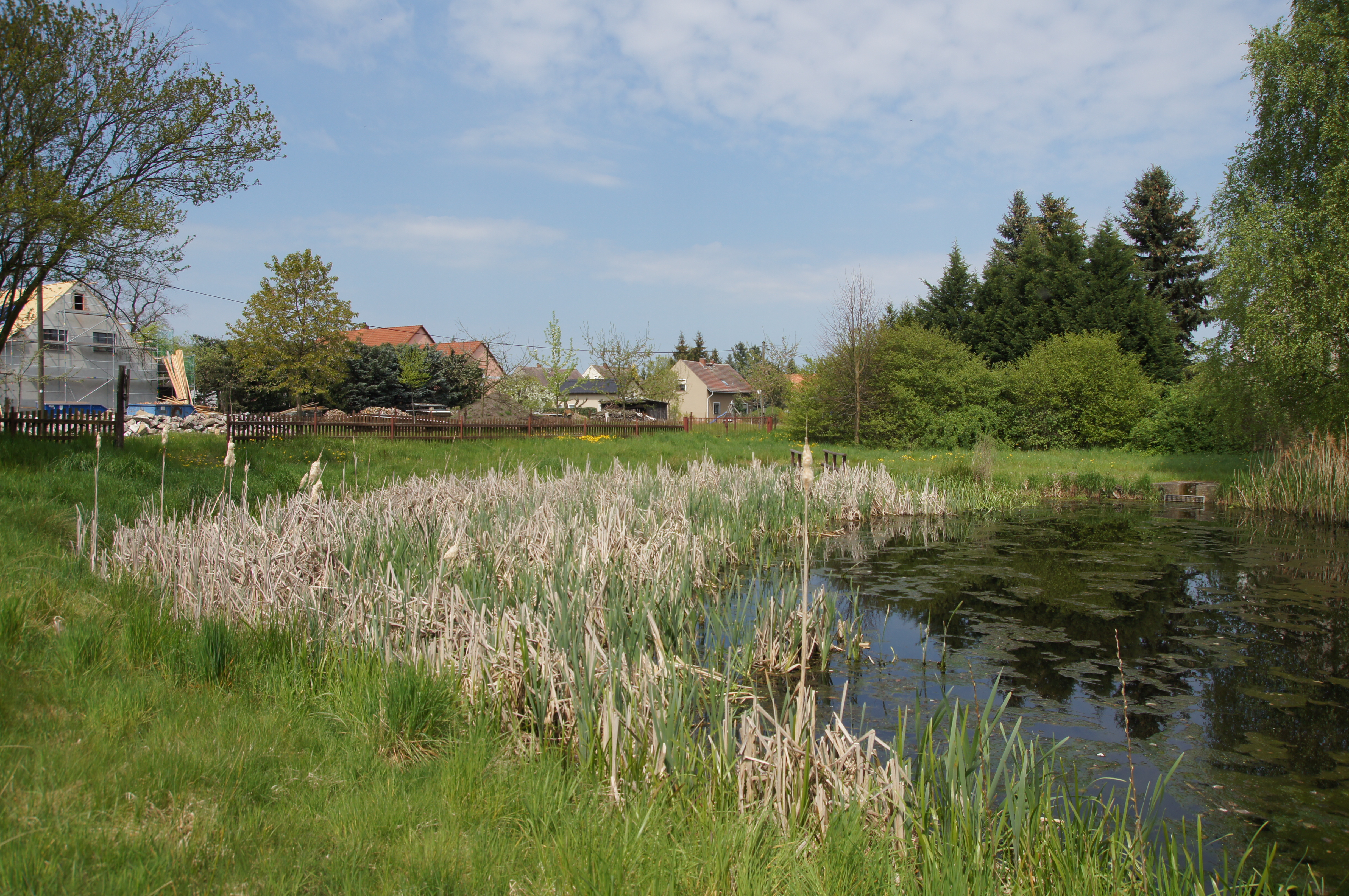 Caminau Dorfteich Hornjoserbsce: Wjesny hat w Kamjeneji